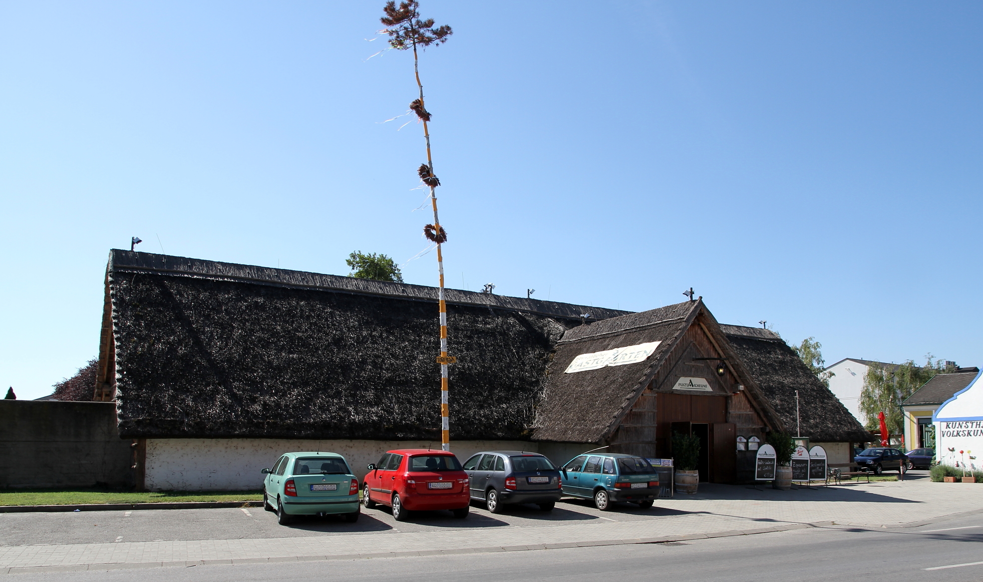 Die wiederaufgebaute - ehemals denkmalgeschützte - Kreuzscheune, auch als Rohr- und Pustascheune bezeichnet, in der burgenländischen Gemeinde Illmitz.